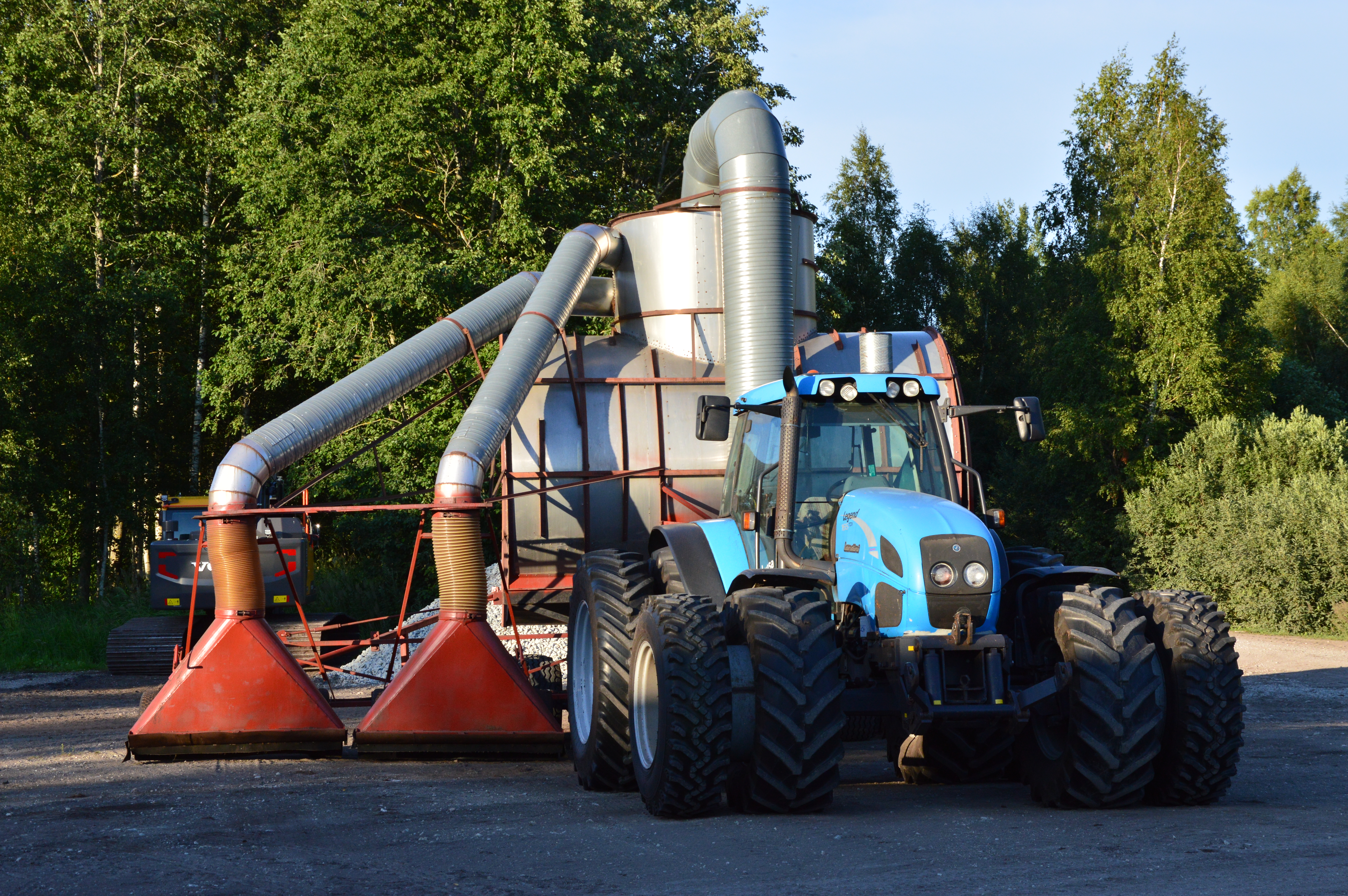 Tõnumaa rabas kasutatav turbaimur.